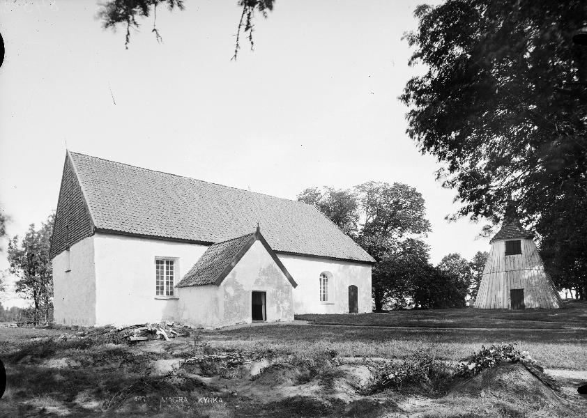 Magra kyrka